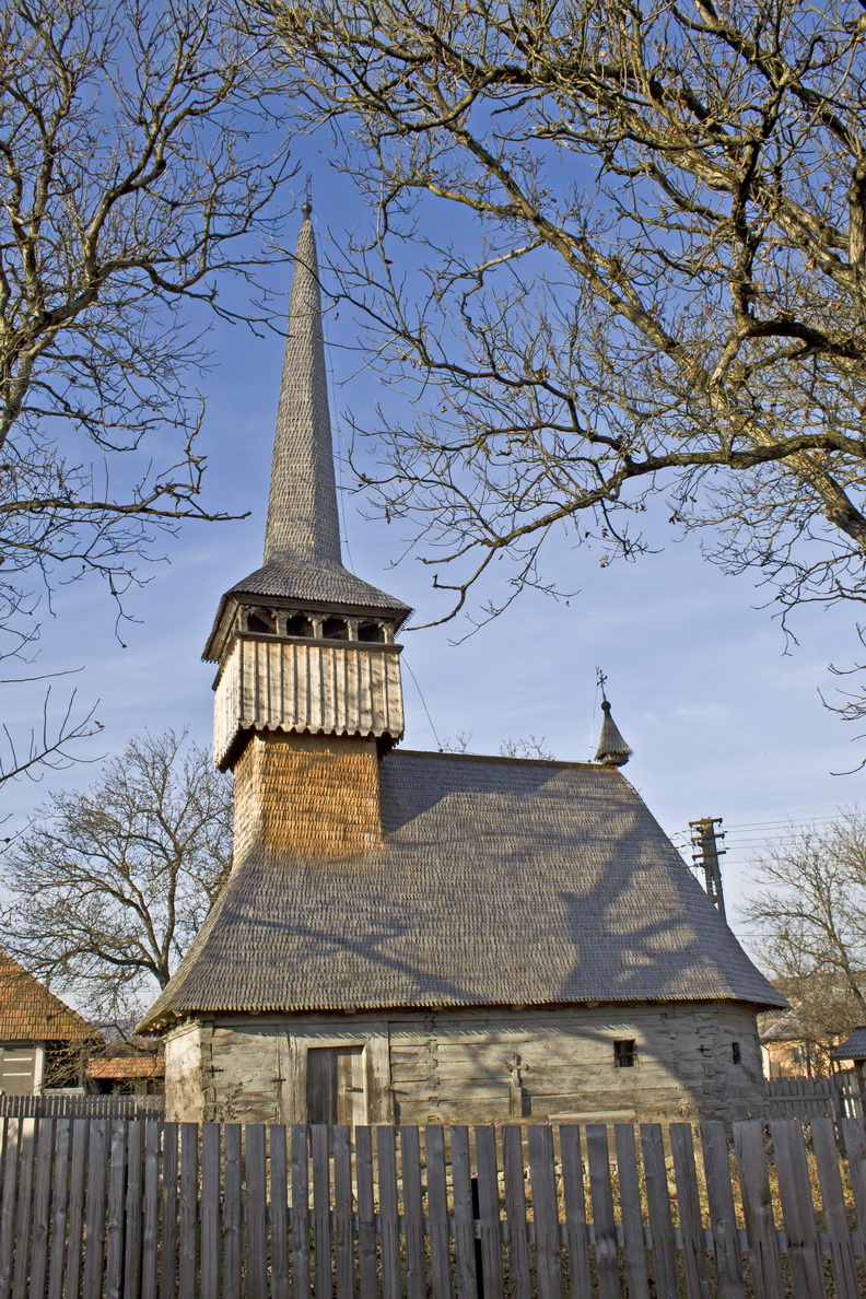 Szűz Mária-fatemplom, 18. század (Létka)